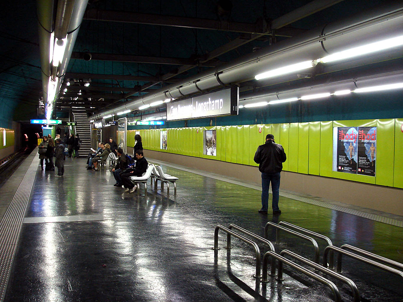 Station Cinq Avenues - Longchamp du métro de Marseille, France.